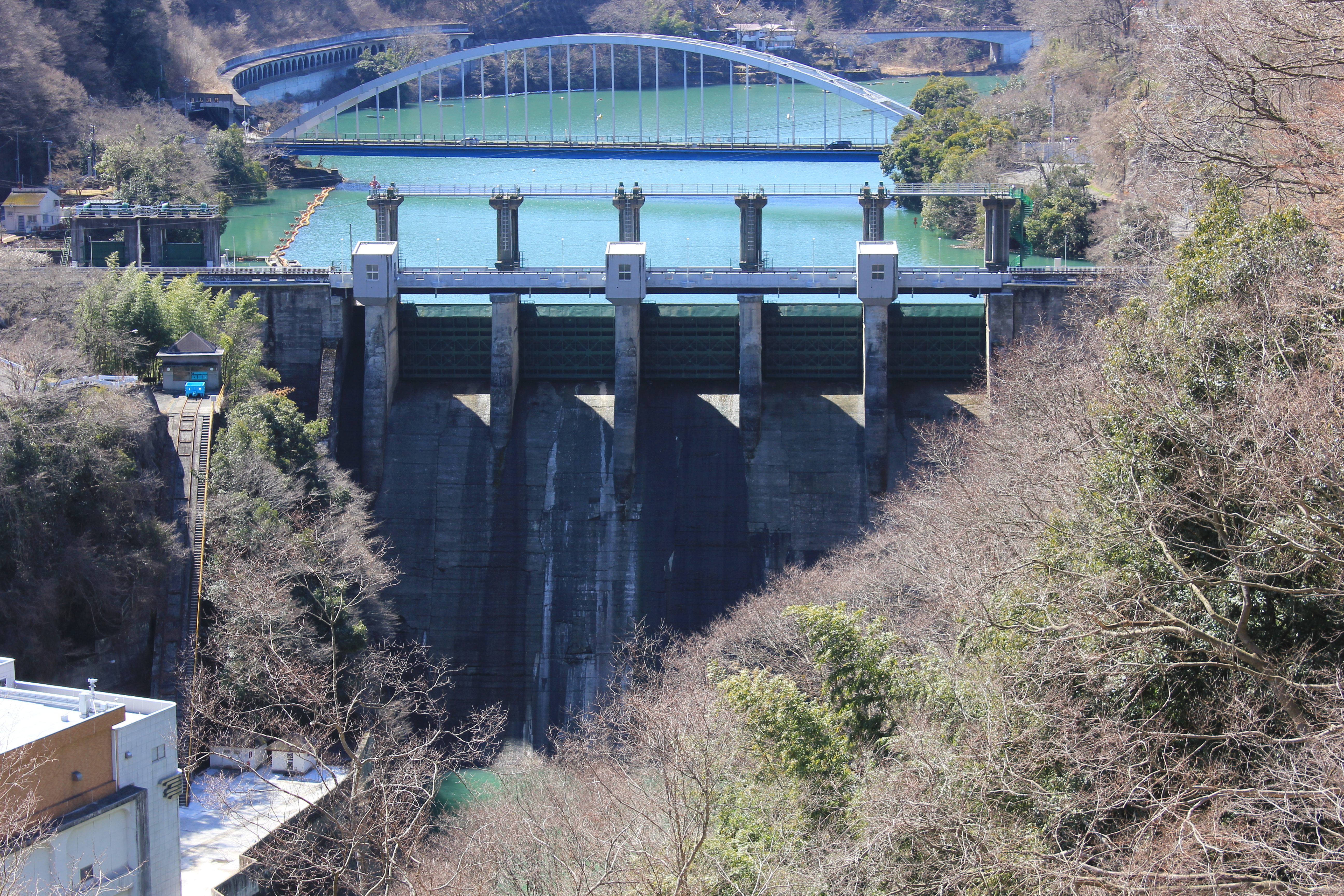 相模ダム（相模川・神奈川県。神奈川県企業庁管理）